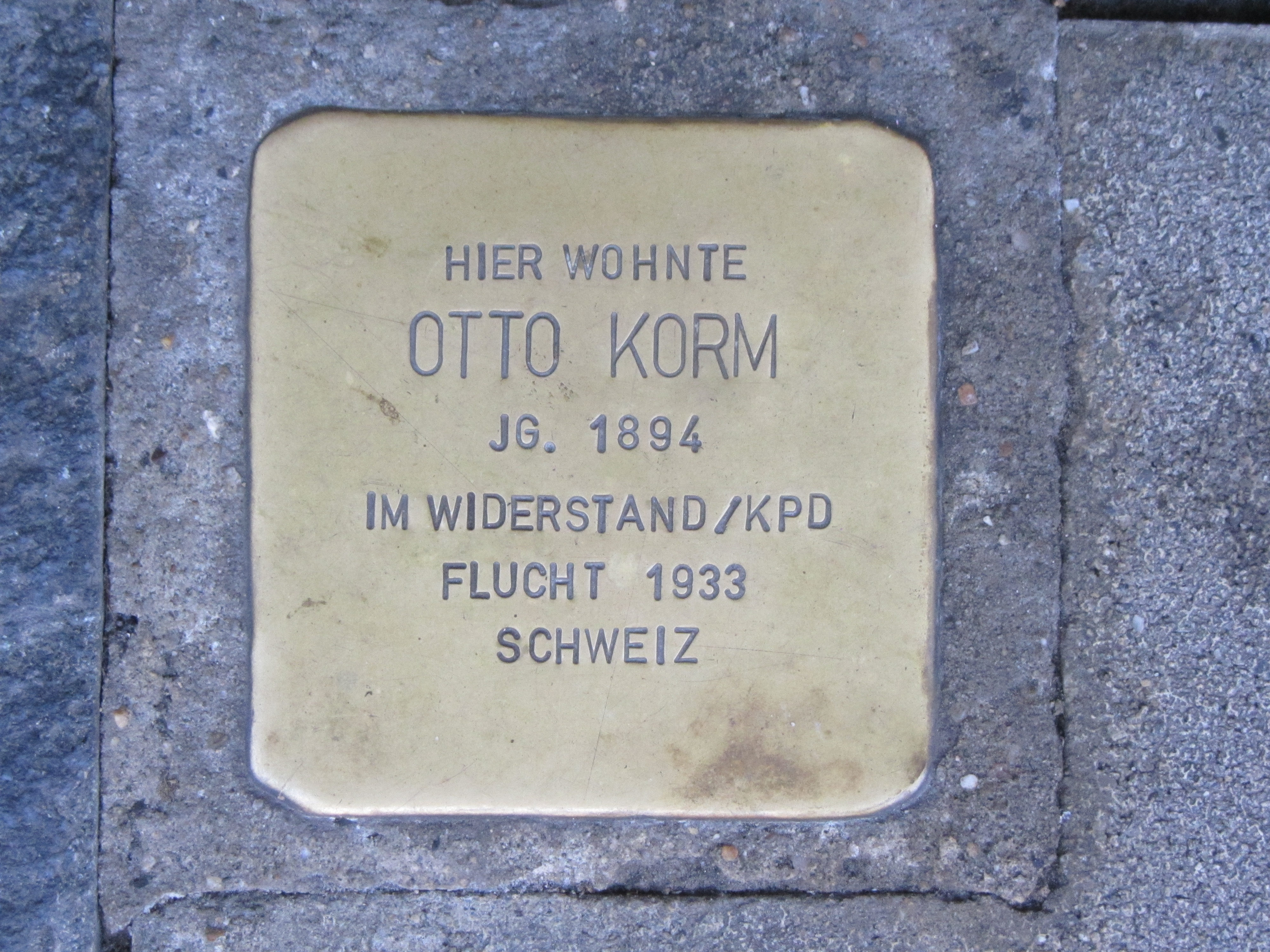 der Stolperstein für Otto Korm vor dem Haus Ekkehardstraße 21 in Singen